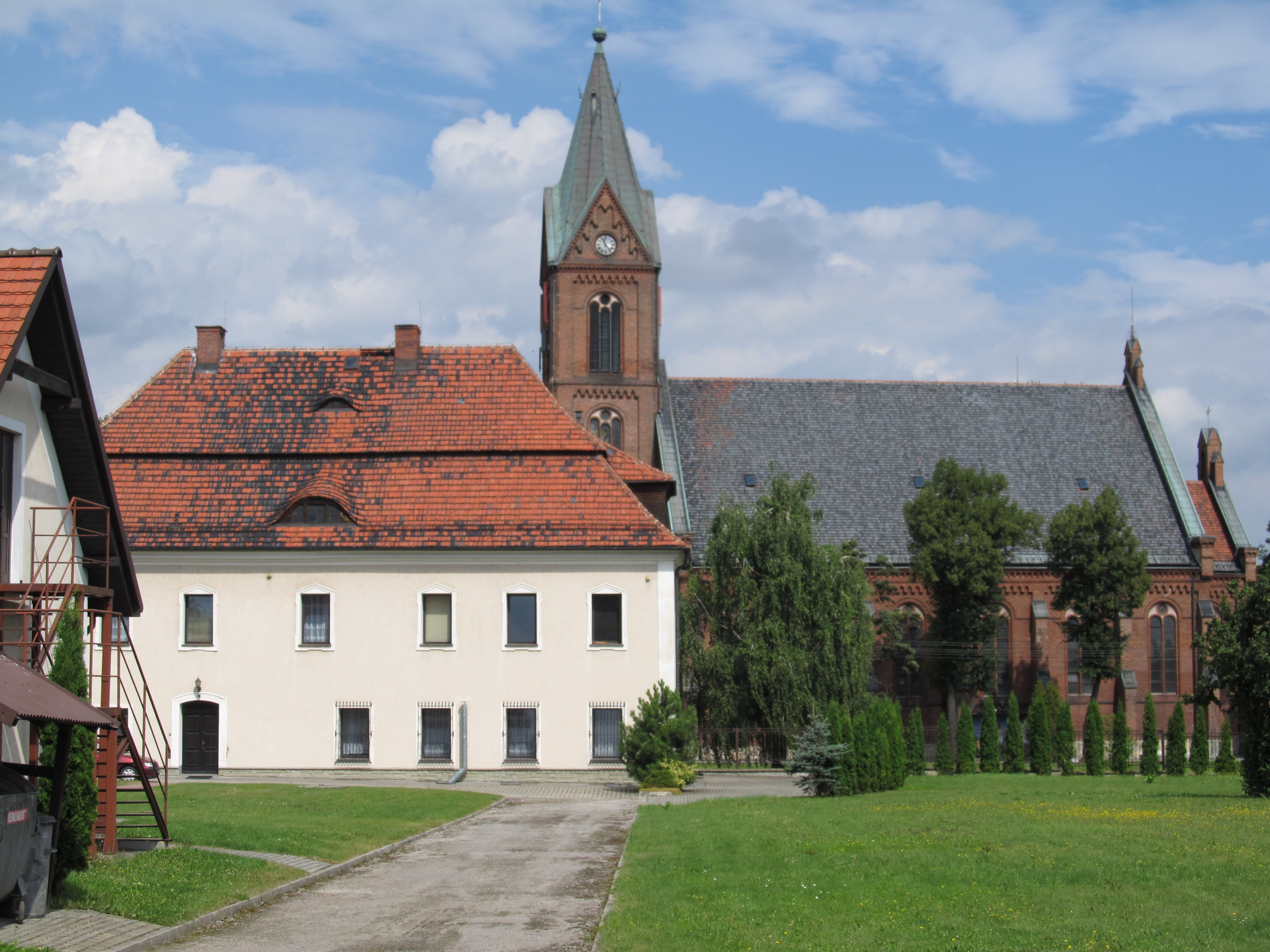 Gliwice Bojków, ul. Bojkowska - plebania z XVIII wieku (zabytek